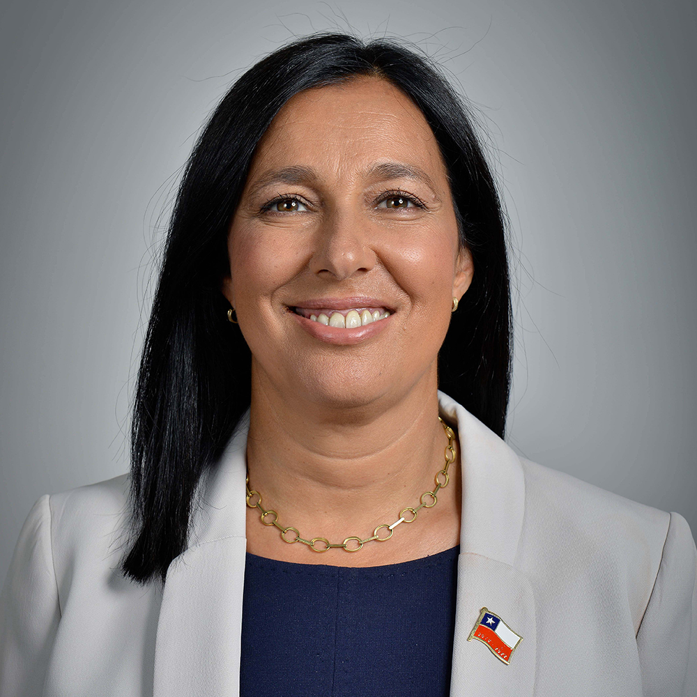 Foto oficial de Pauline Kantor como ministra